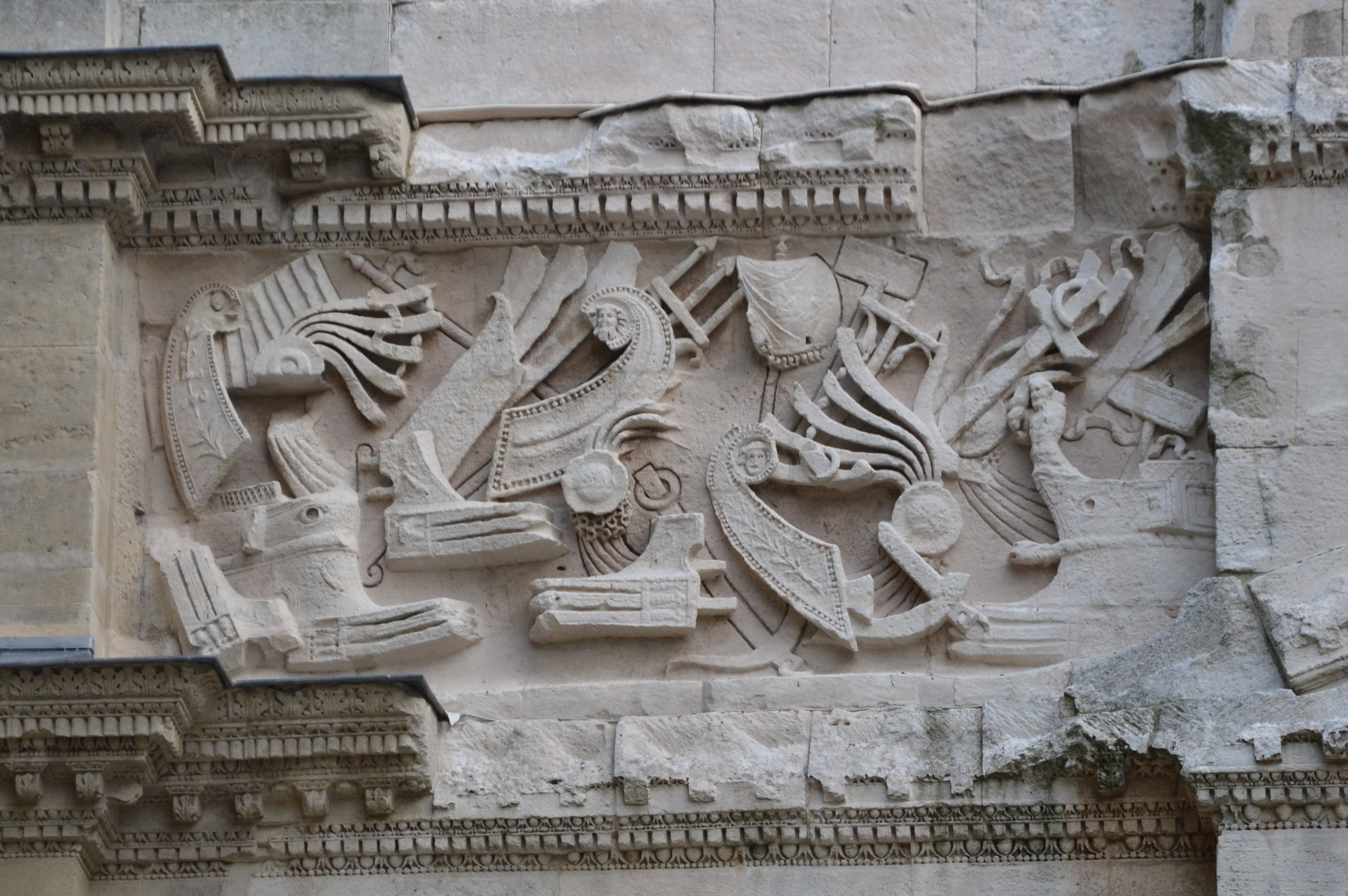 Arc d'Orange (ClasséClassé) .